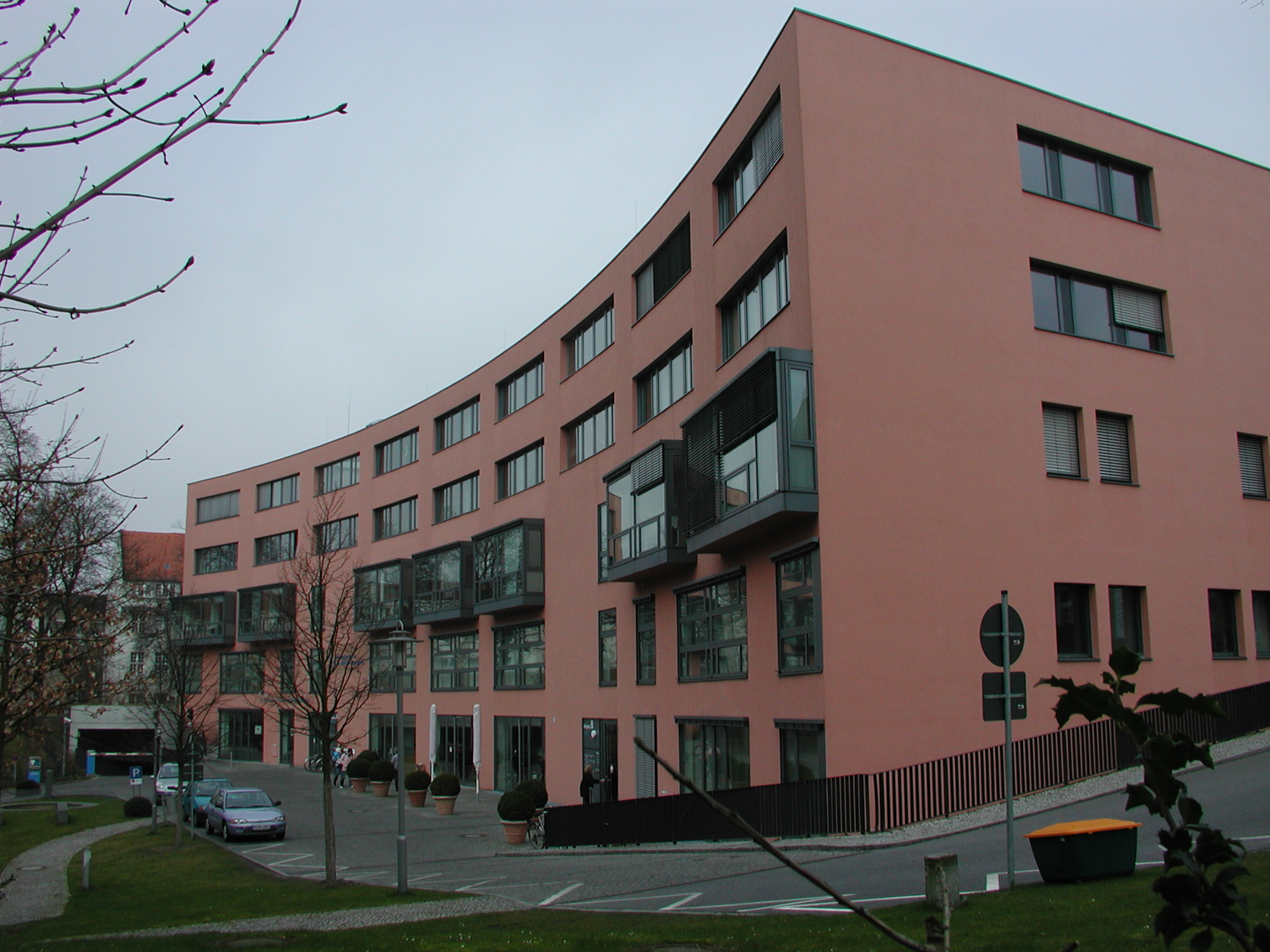 neu gebautes "MedizinZentrum" im OZK